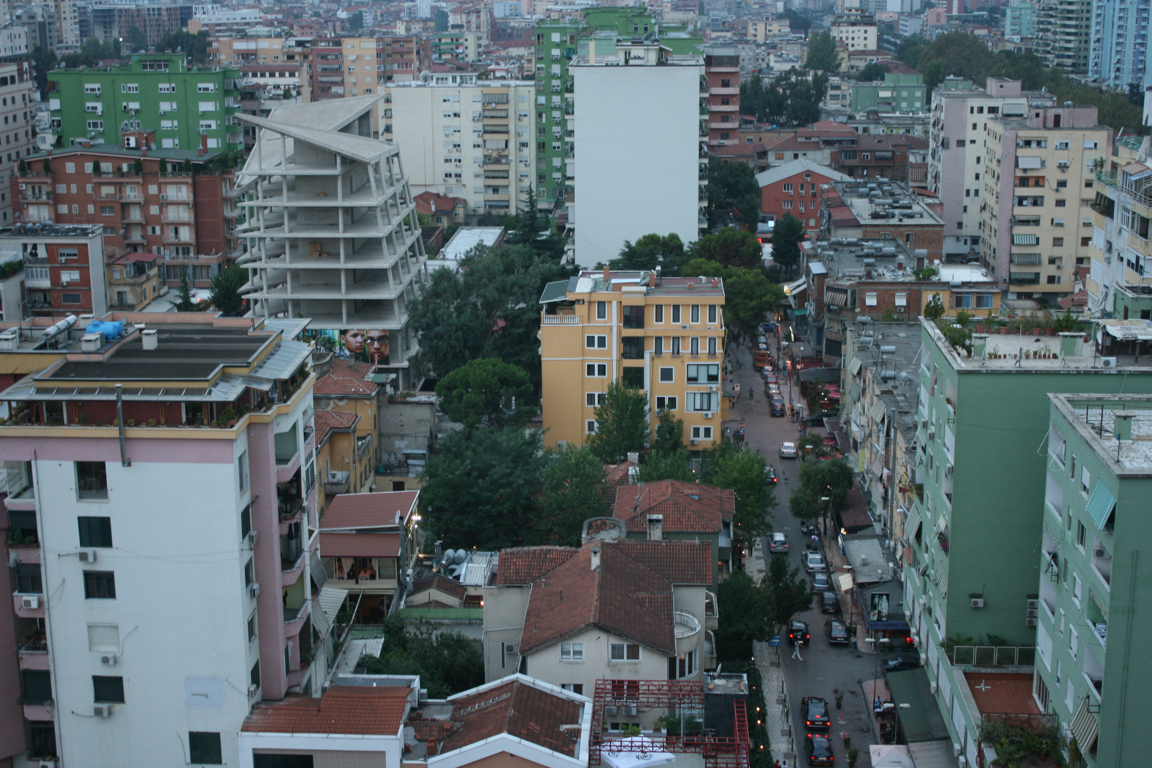 Dusk in Tirana